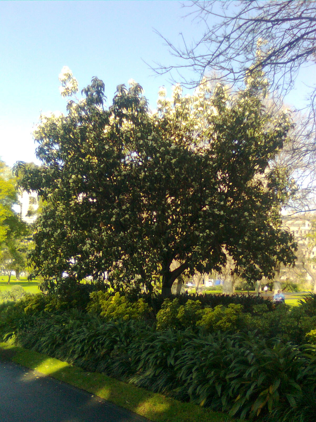 अनंताचे झाड. हिवाळ्यात जुलै महिन्यात मेलबर्न येथे फुललेला वृक्ष. दुपारची वेळ असून तापमान सुमारे १० अंश होते.